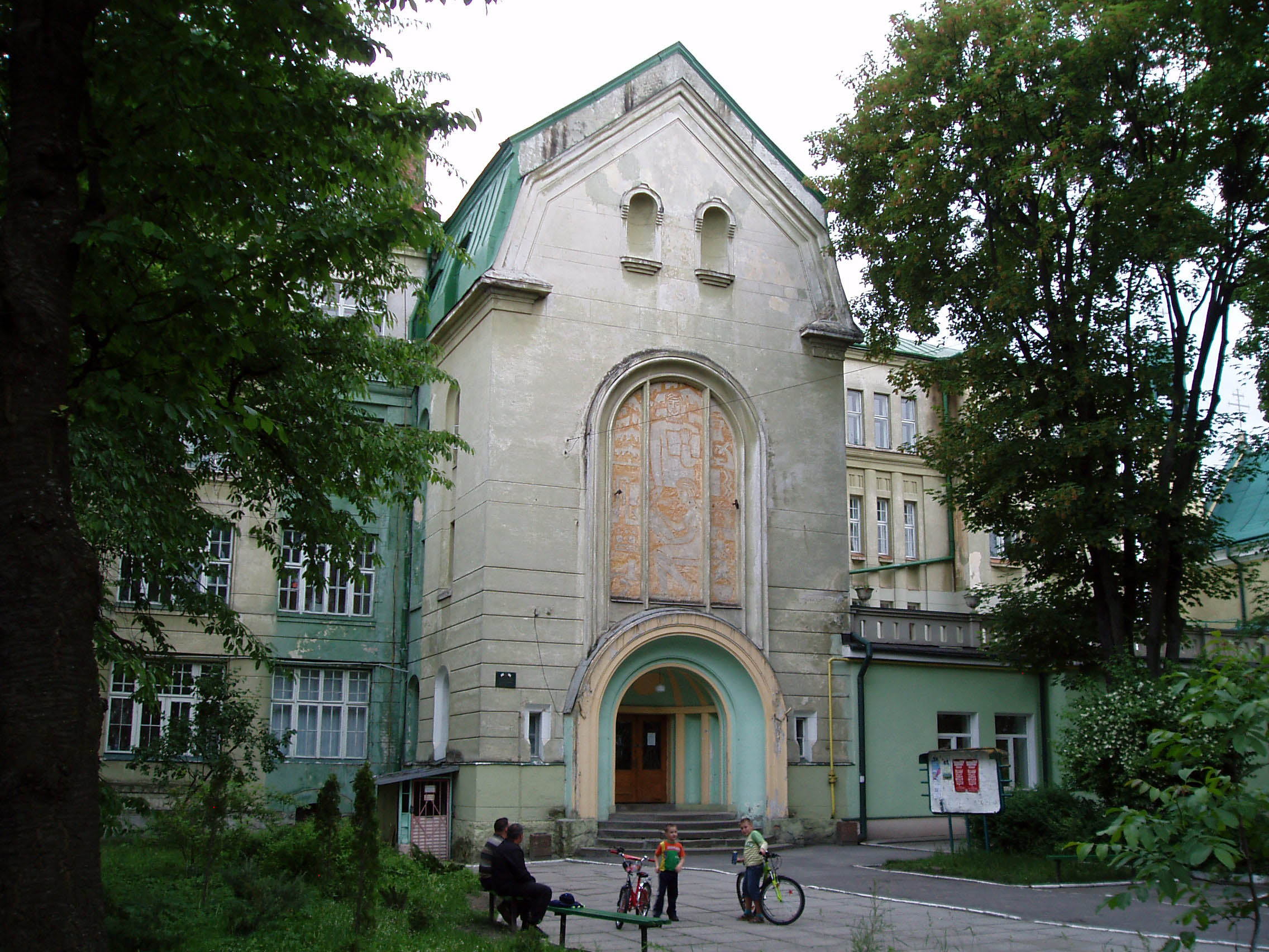 Колишній реколекційний дім єзуїтів на вулиці Залізняка, 11 у Львові